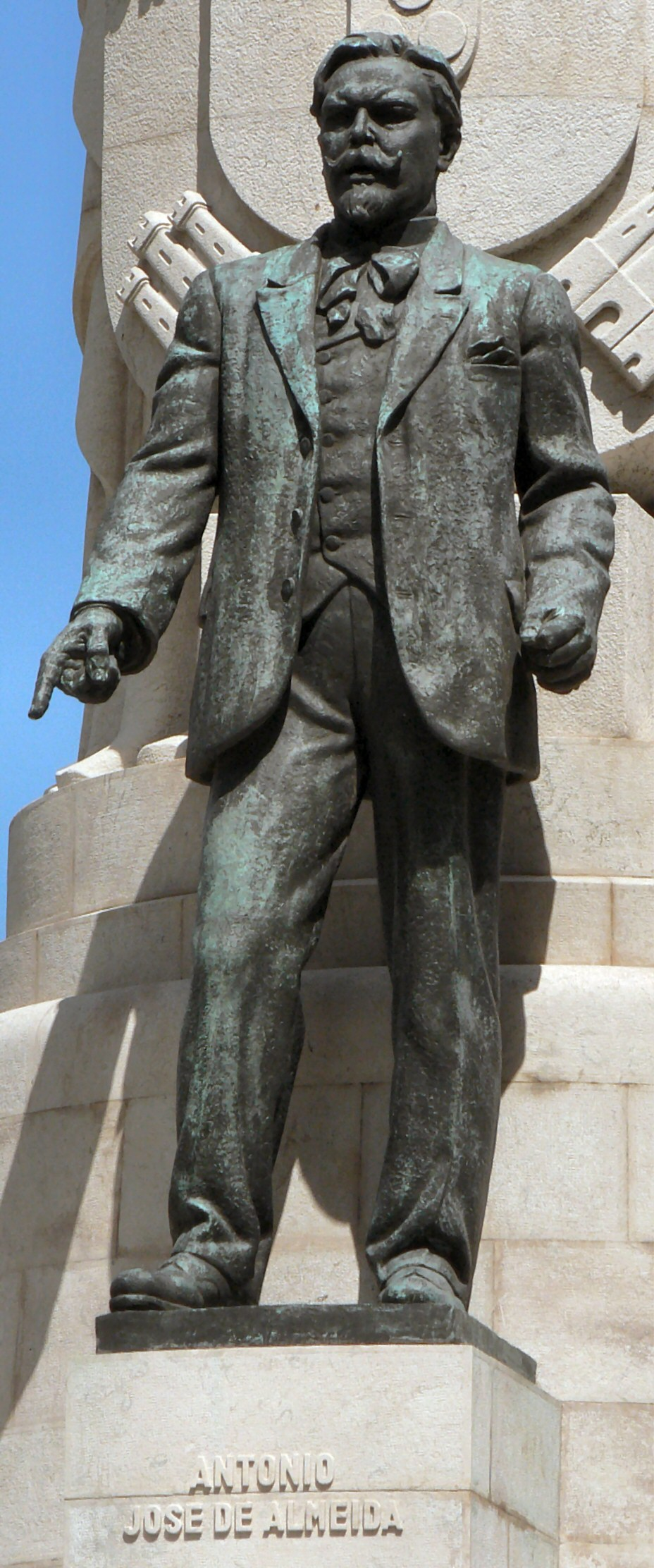 Estátua de António José de Almeida em Lisboa